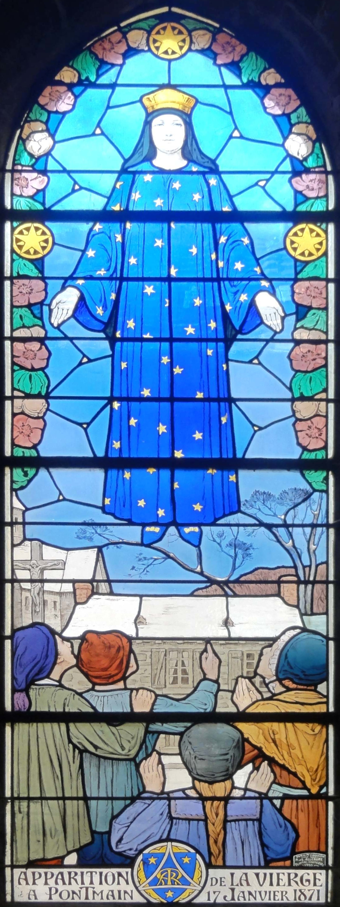 Bas-côté sud, verrière n° 16 - apparition de la Vierge à Pontmain le 17 janvier 1871.